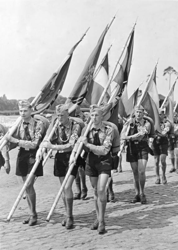 H.J. marschiert zum Reichsparteitag nach Nürnberg. Vom Grabe Herbert Norkus ging der Marsch. Täglich werden 22km zurückgelegt.